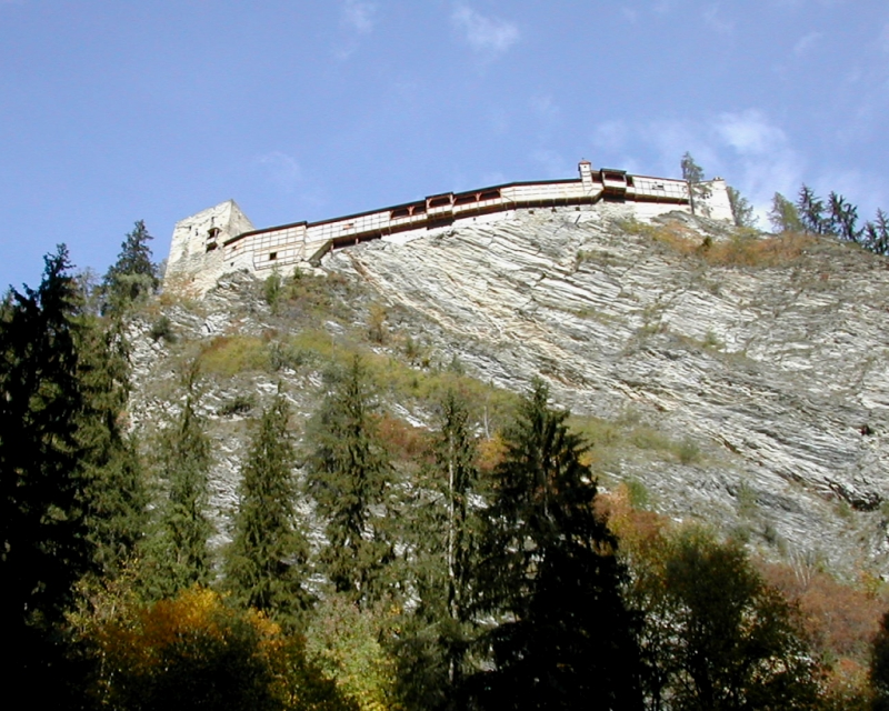 Burg Berneck bei Kauns